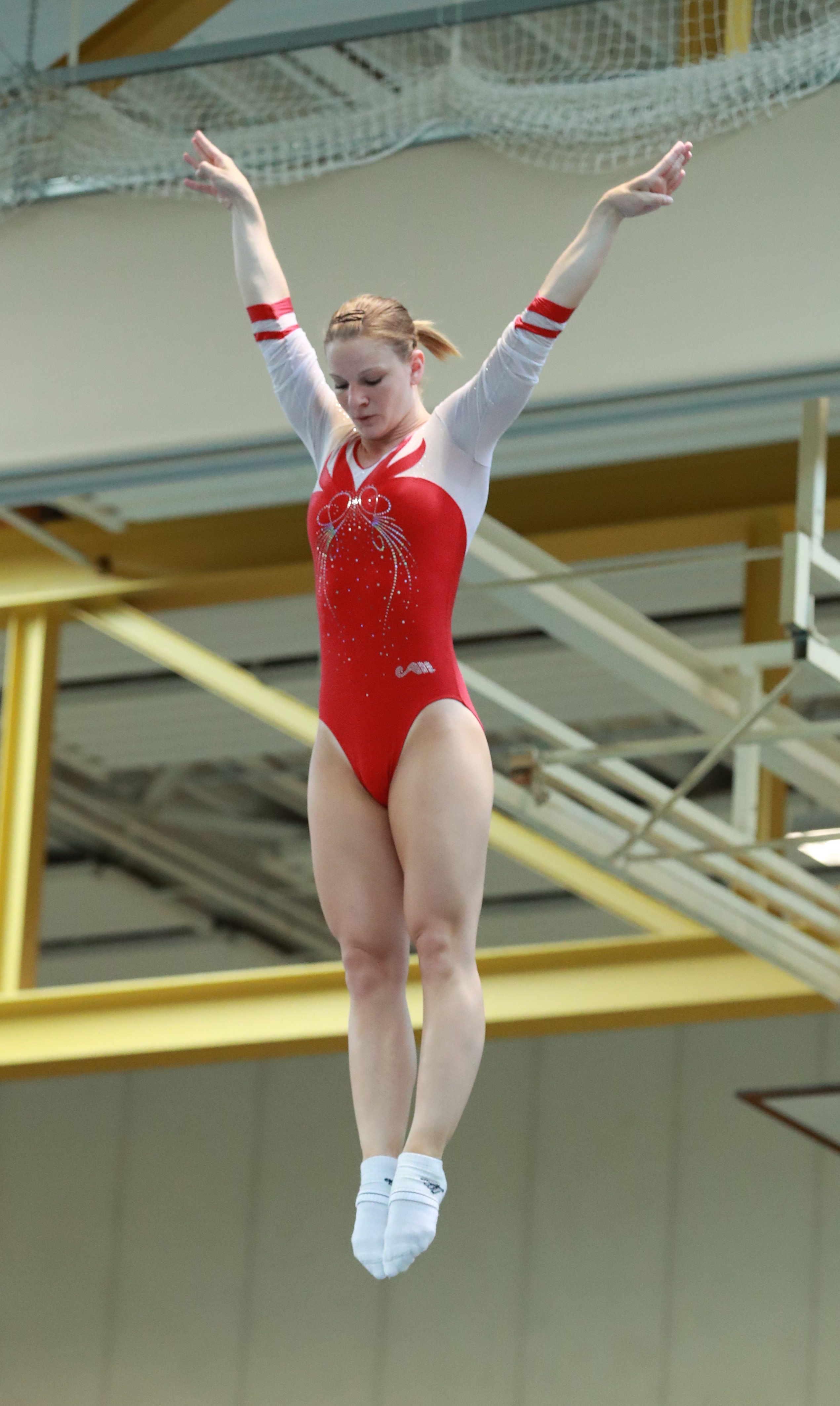 Wettkampf 9 Elite weiblich Erwachsene 2001 und älter Finale beim 9. Internationalen Filder Pokal im Trampolinturnen 2018 in Ruit. Abgebildet: Leonie Adam.